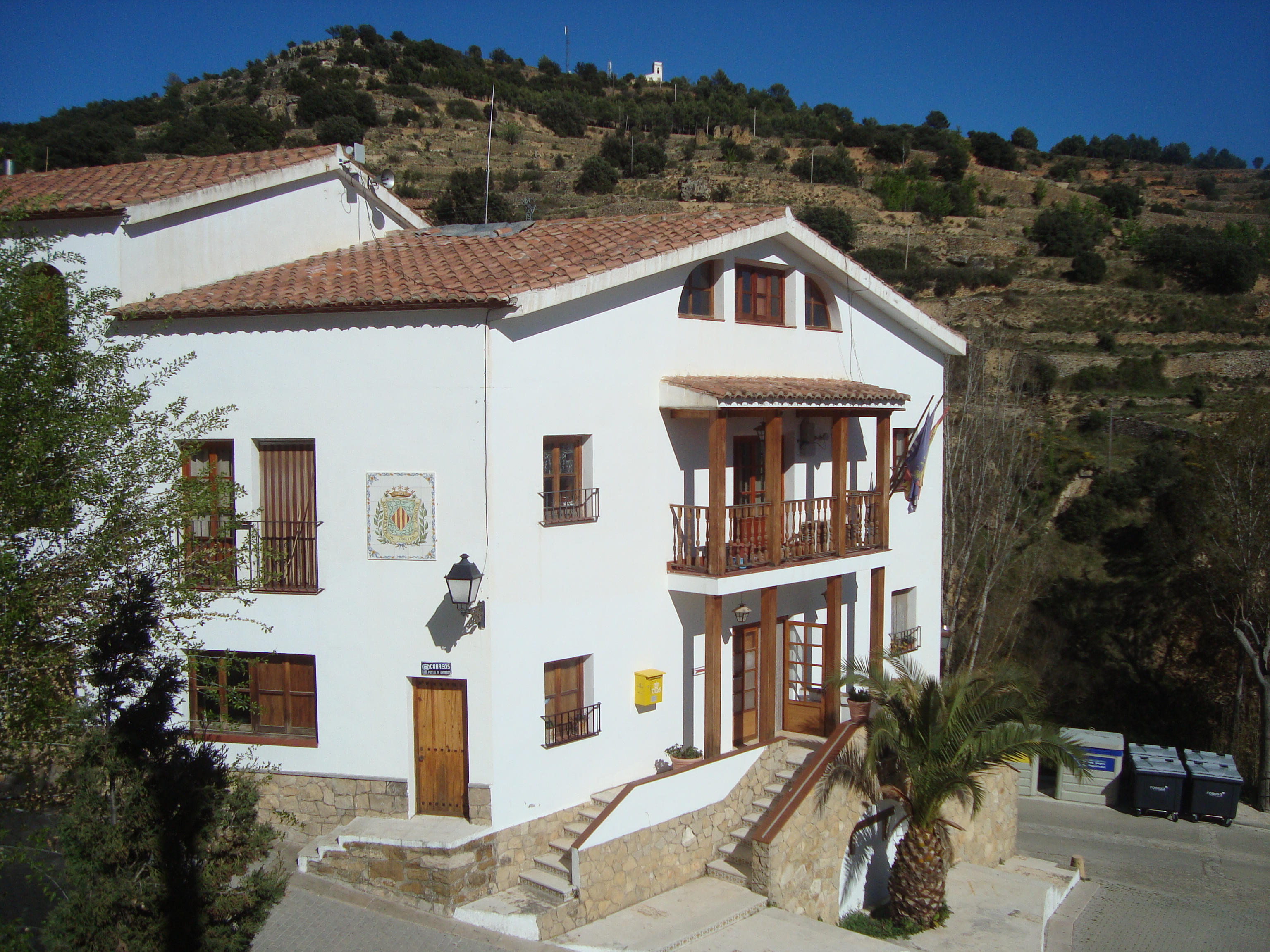 Ayuntamiento de Cortes de Arenoso (Alto Mijares, Castellón)